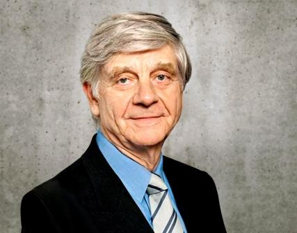 Stockfoto von Klaus-Peter Johanssen